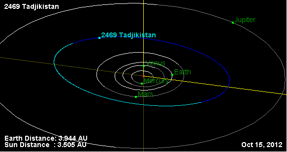 Орбіта астероїда 2469 Таджикістан